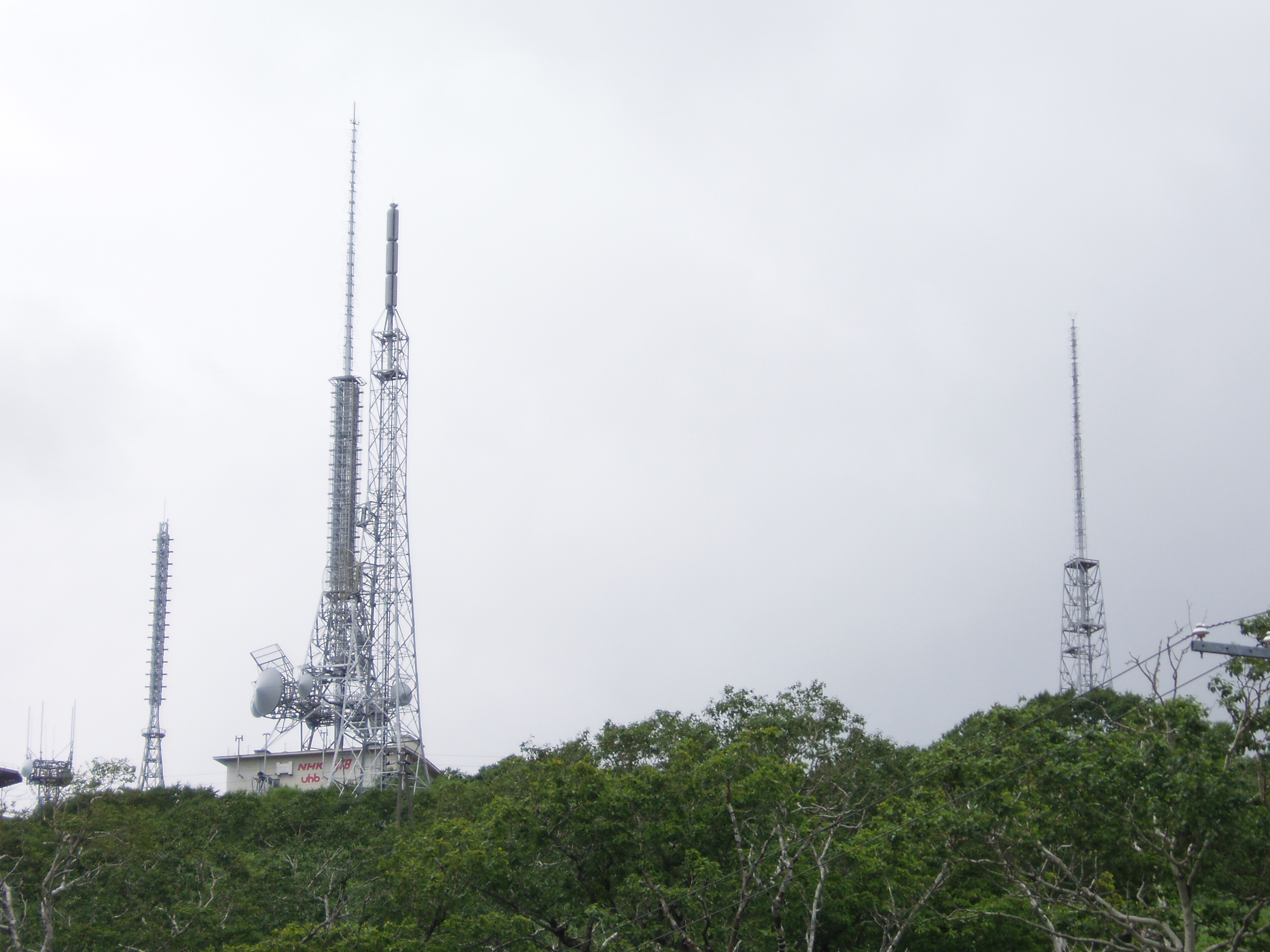 知駒岳山頂